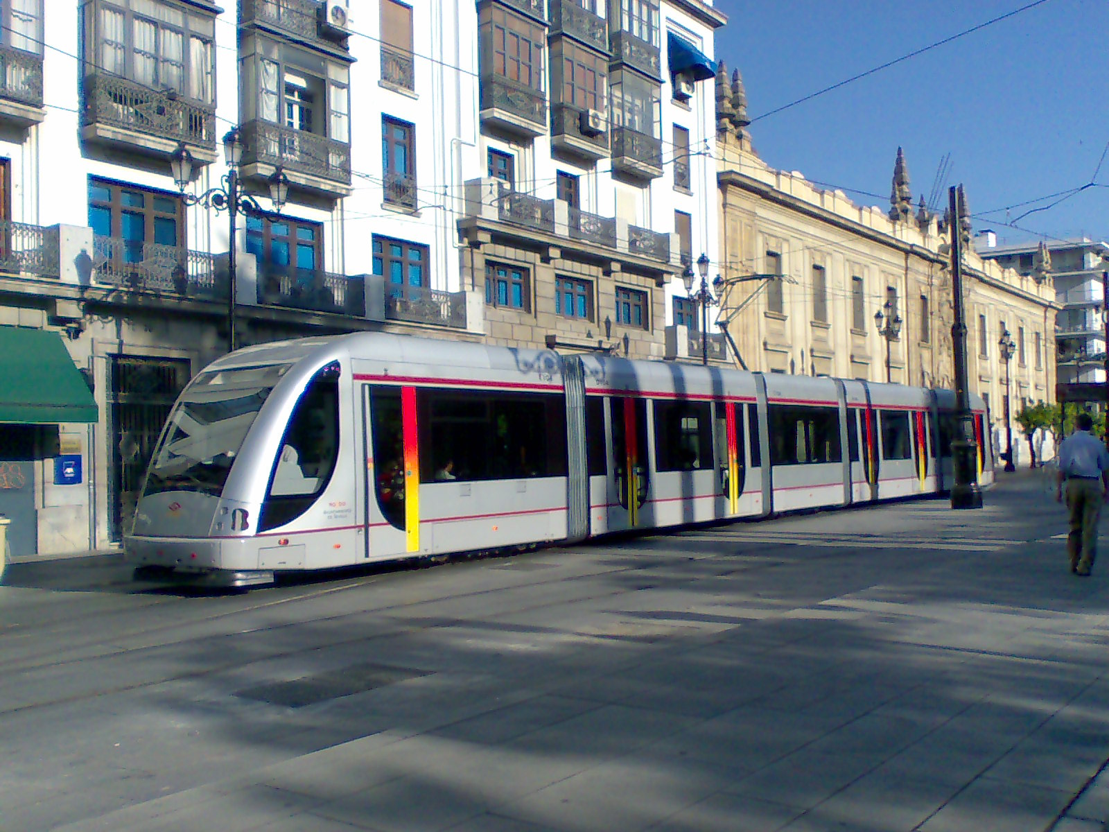 Metro-tren de Sevilla en Avda. Cosntitucíón